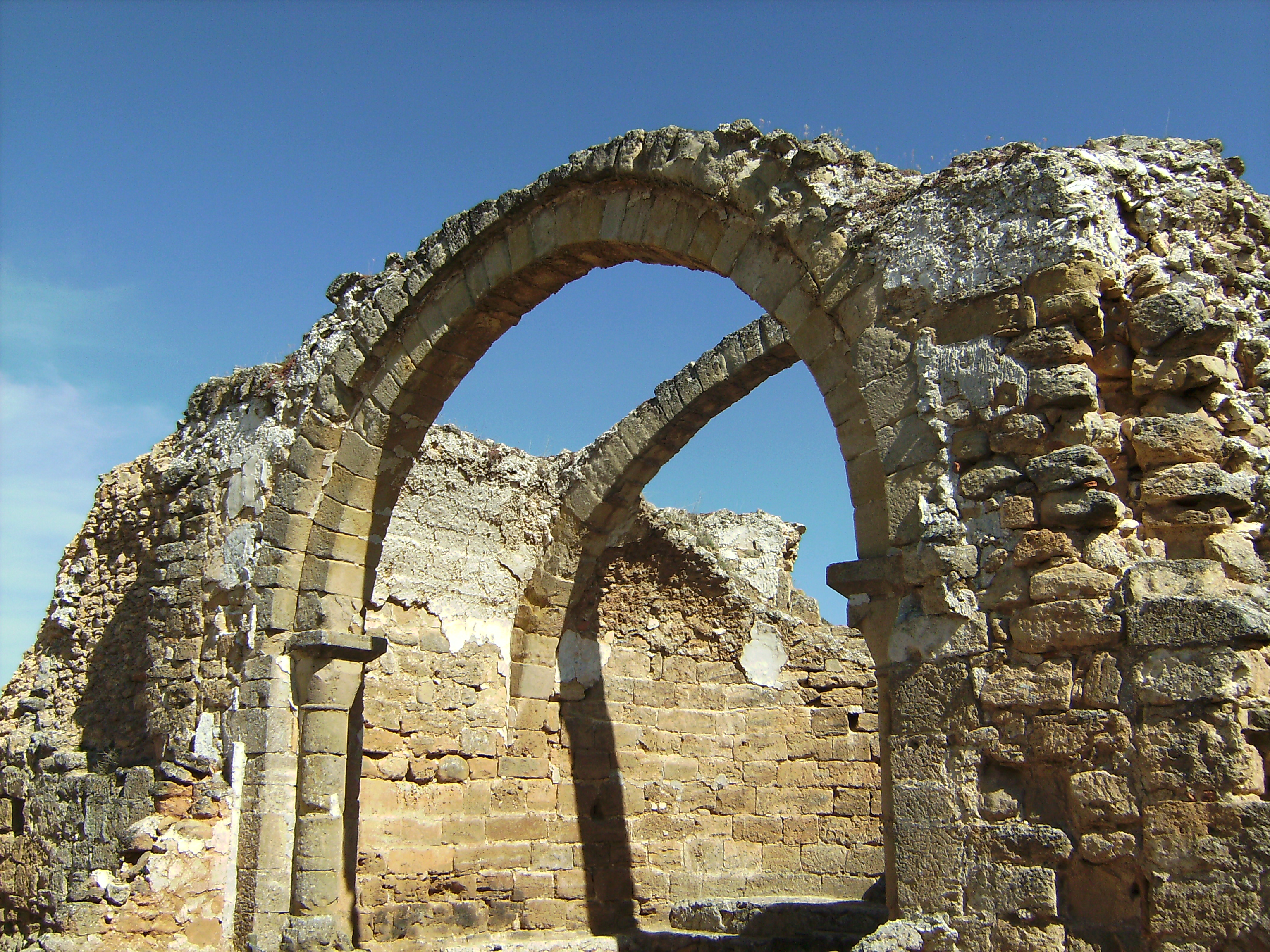 Recopolis - Basilica (Interior)